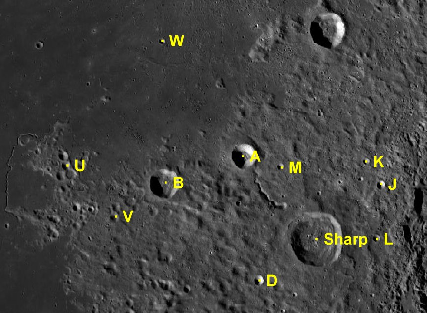 Cráter lunar Sharp. Cráteres satélite. (Imagen LRO)